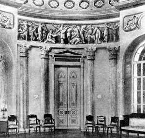 Lyublino Villa near Moscow